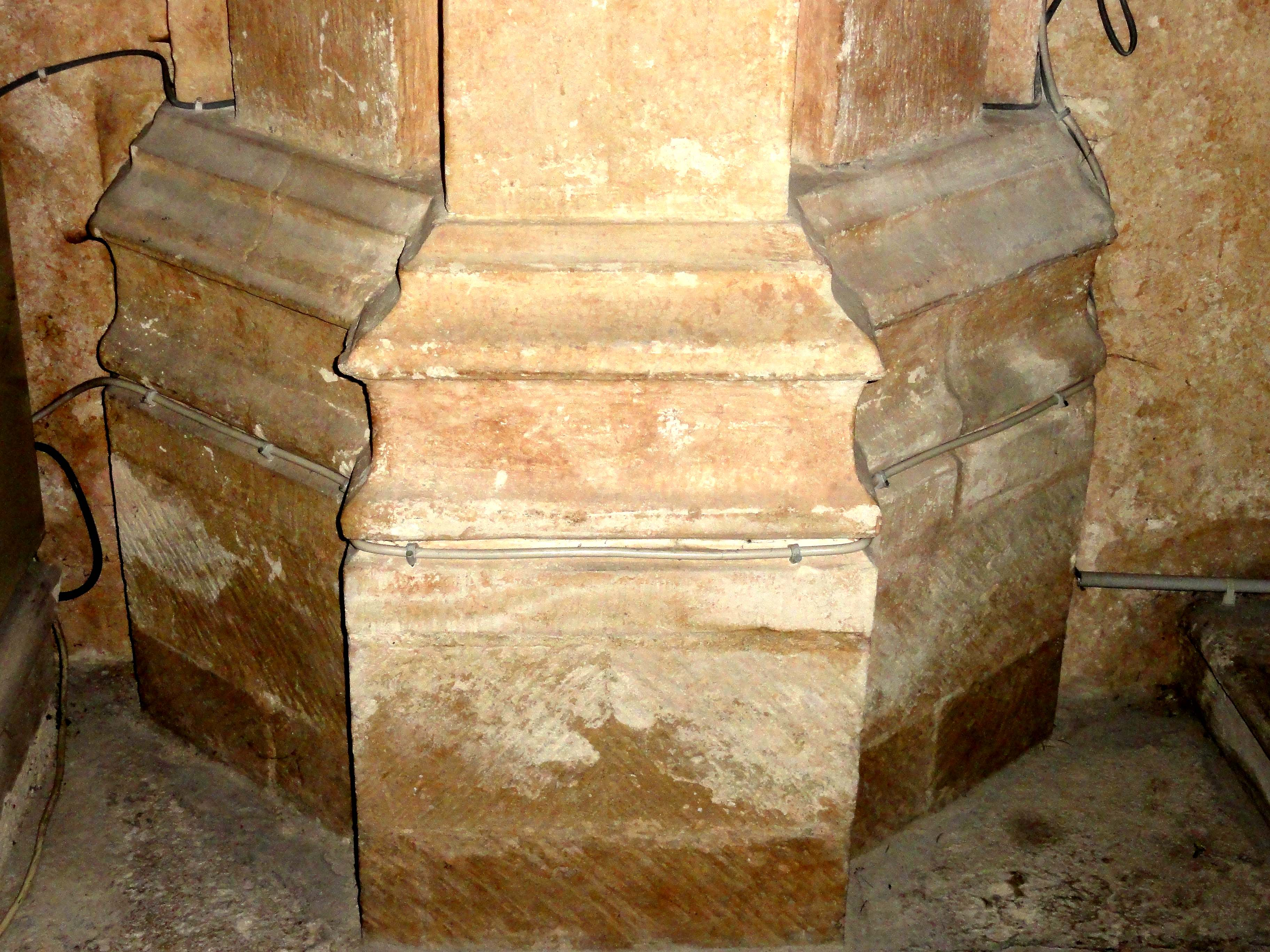 Intérieur de l'église - voir titre.